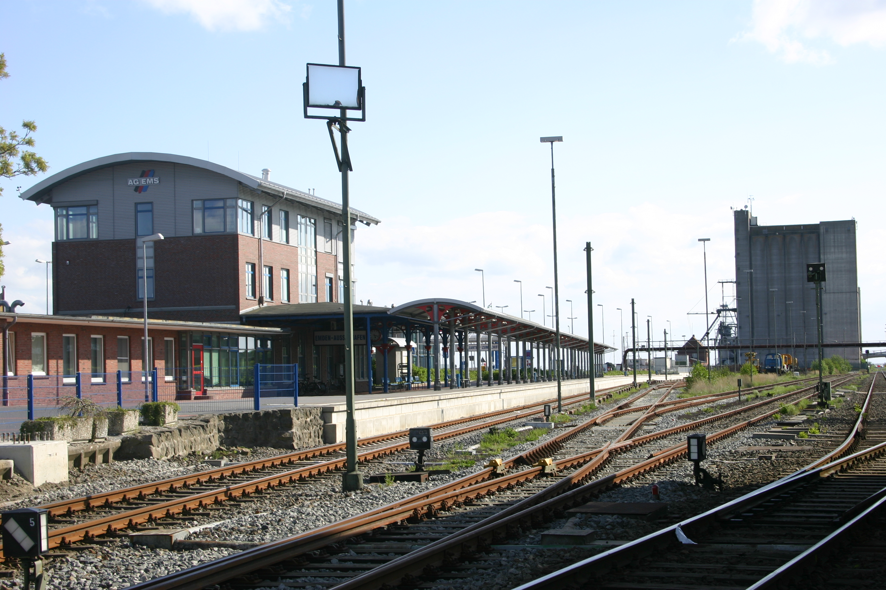 Bahnhof Außenhafen in Emden, Ostfriesland, Niedersachsen, mit Gebäude der Reederei AG Ems, rechts im Bild Getreidesilos